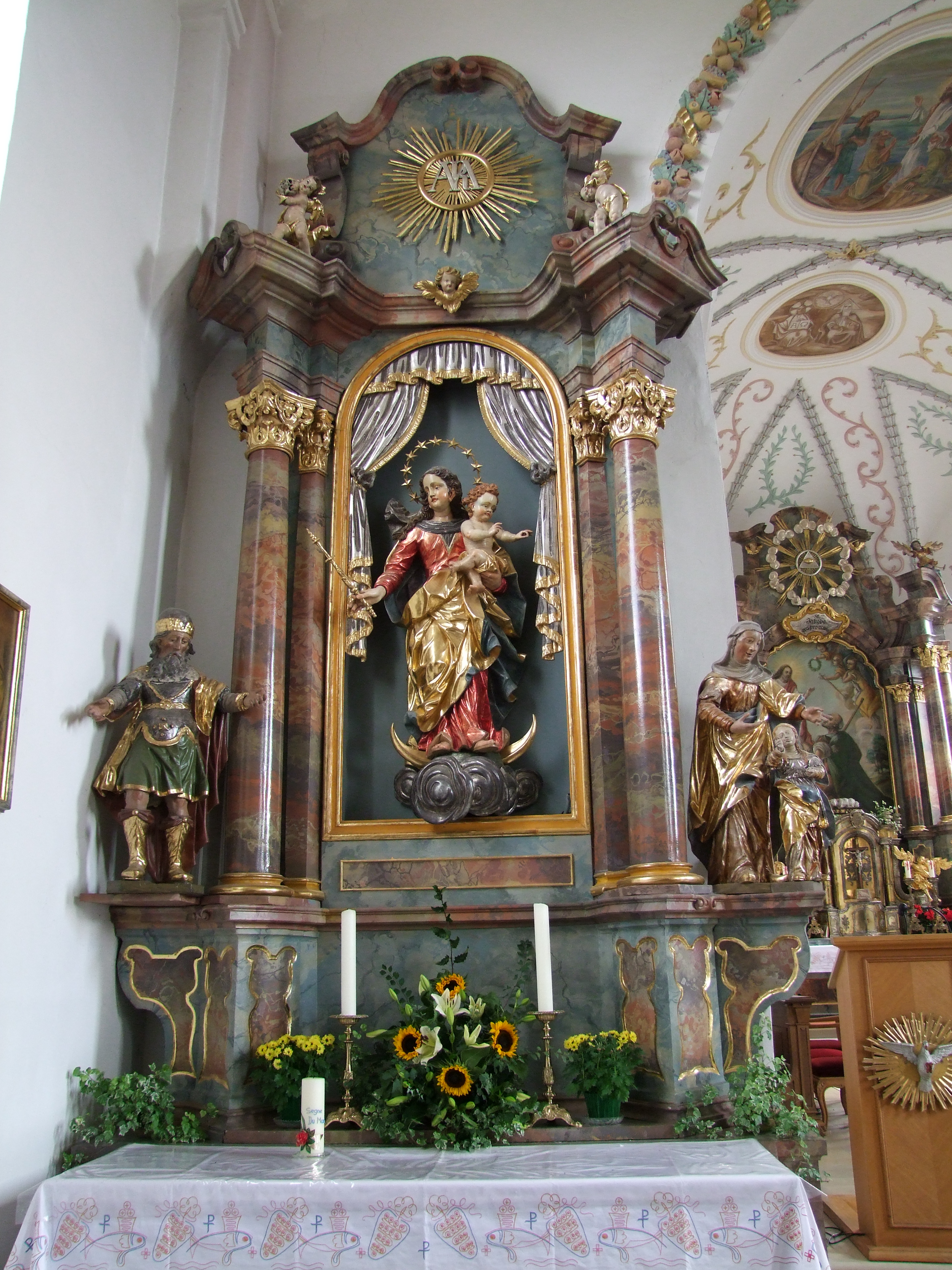 St. Jakobus der Ältere im oberschwäbischen Mindelau, einem Ortsteil der Stadt Mindelheim in Bayern/Schwaben